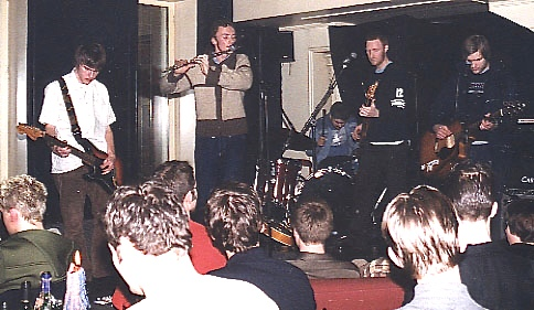 Emily Lang under bylarm i Bergen 2000. Gunnar Andreas Aldin Thune til venstre, Benjamin Rokseth, Trommist Robert Jønnum, Sveinung Nesheim og Thomas Hansen helt til høyre